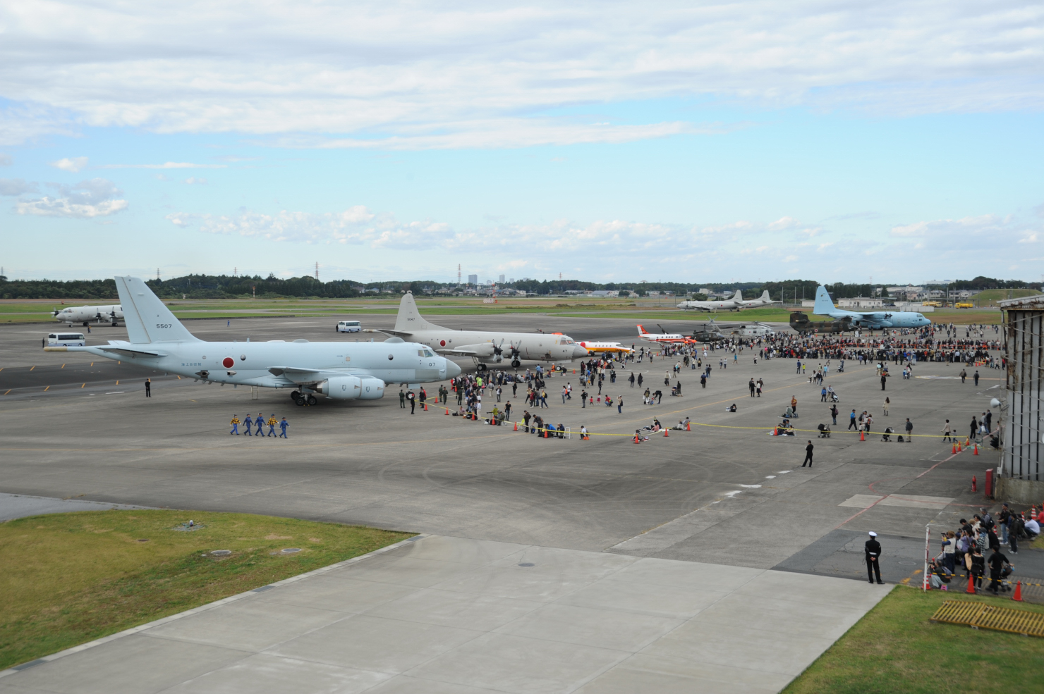 平成２８年１０月２９日（土）に「海上自衛隊 下総航空基地 開設５７周年記念行事」を開催しました。 当日は記念式典、観閲行進、P-3C体験搭乗、花電車、ミニP-3C公演、横須賀音楽隊、高野太鼓等各種イベントを実施しました。来年も皆様のご来場を隊員一同心よりお待ちしております。